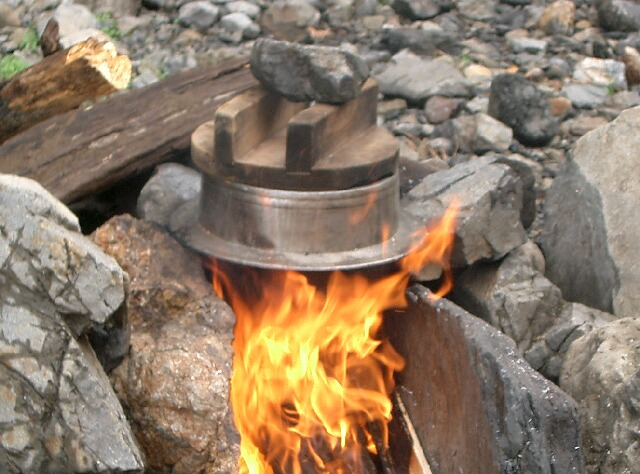 traditioneller japanischer Reiskocher.Rice cooker !